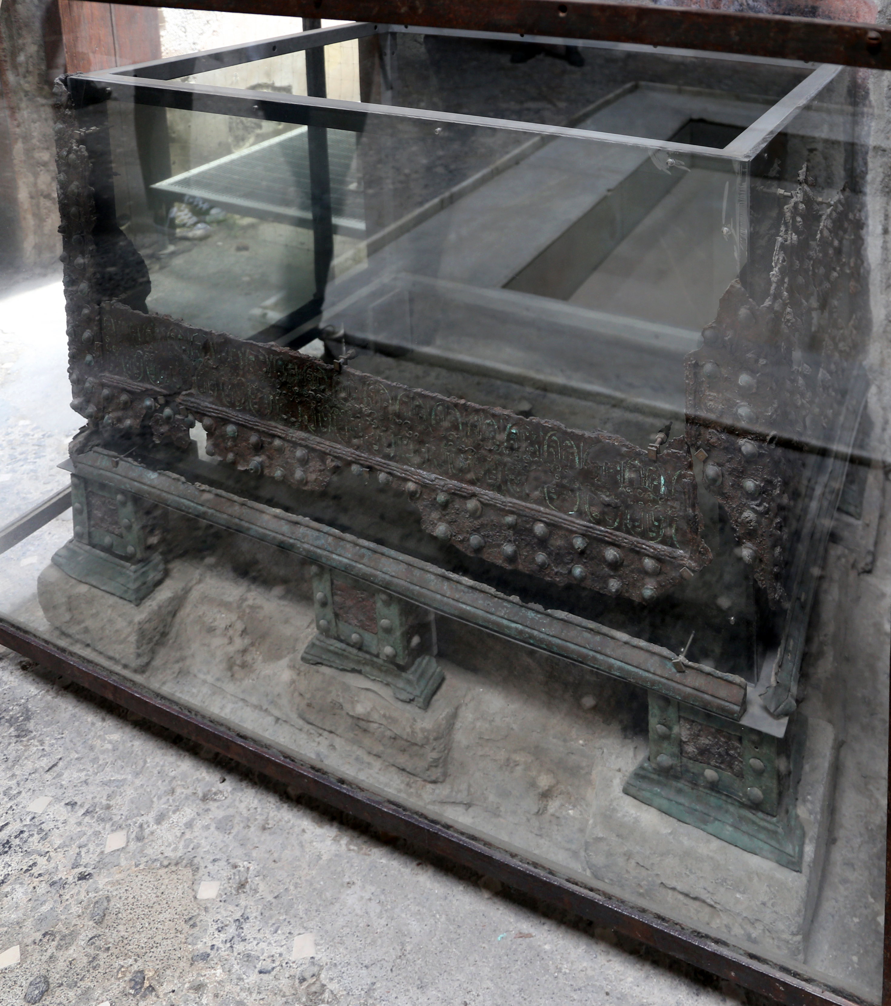 casa dei Vettii This is a photo of a monument which is part of cultural heritage of Italy.